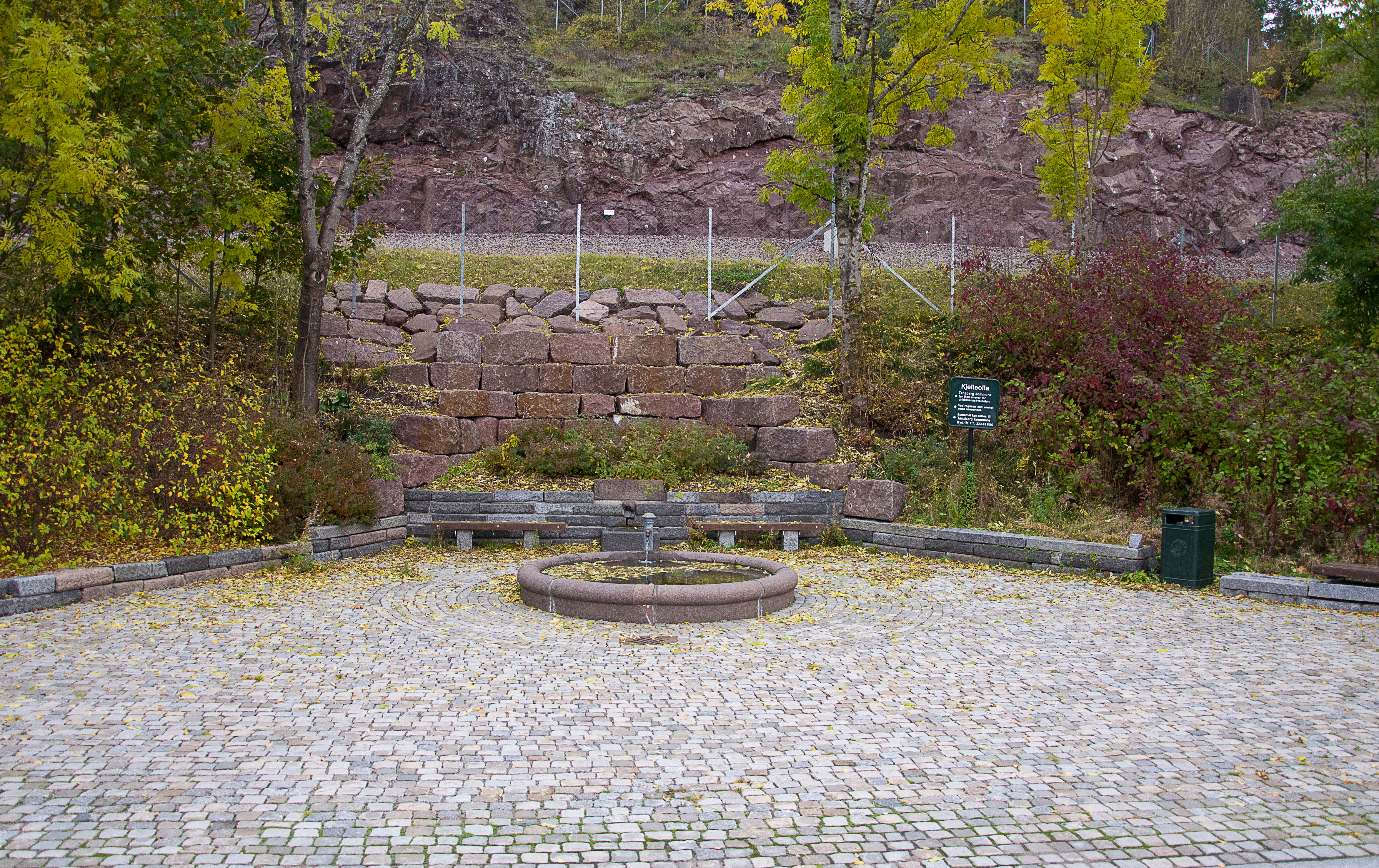 Kjelleolla, også kjent som Frodakelda (Frodakjelda).